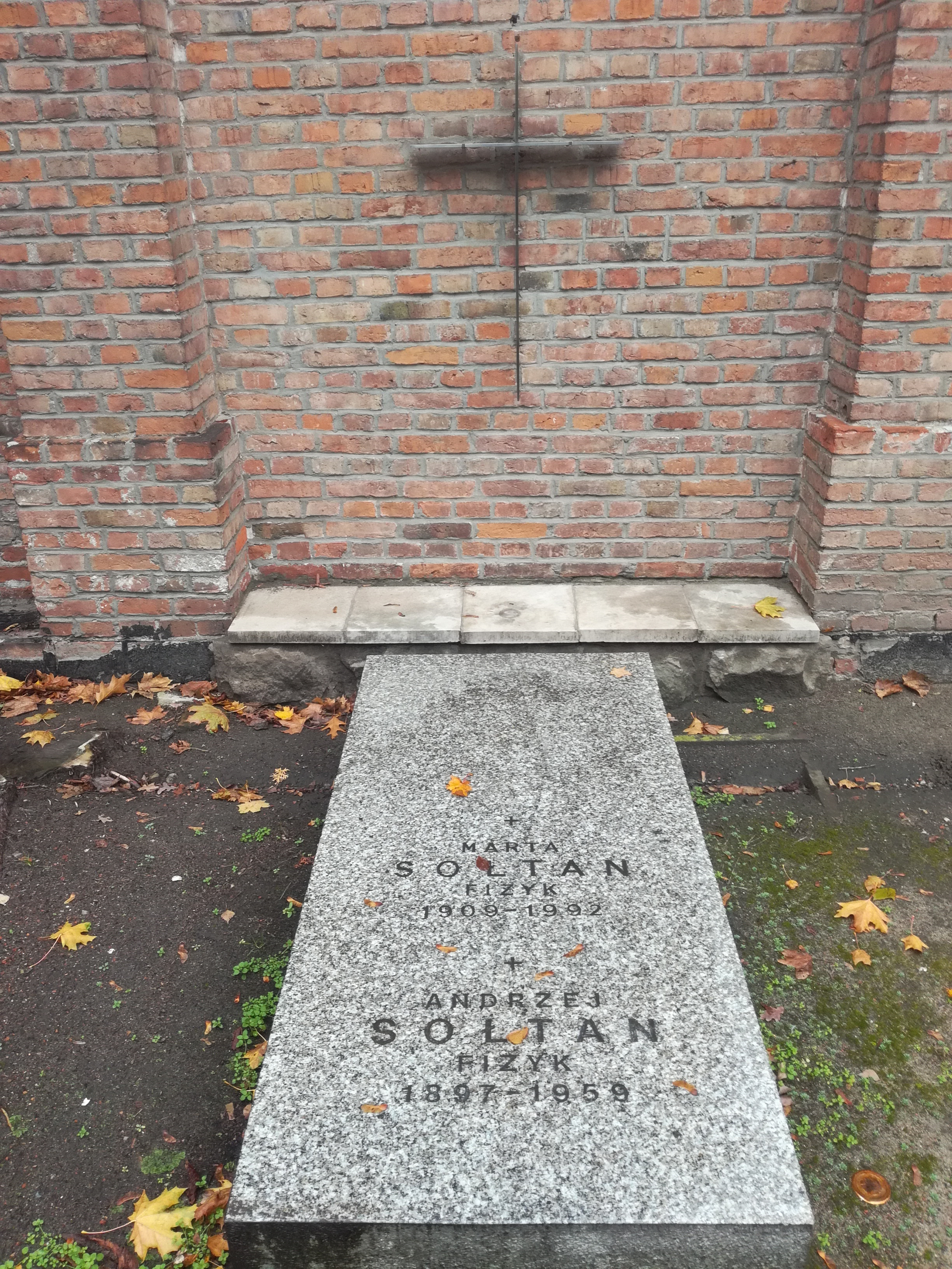 grób fizyka jądrowego Andrzeja Sołtana na Starych Powązkach.